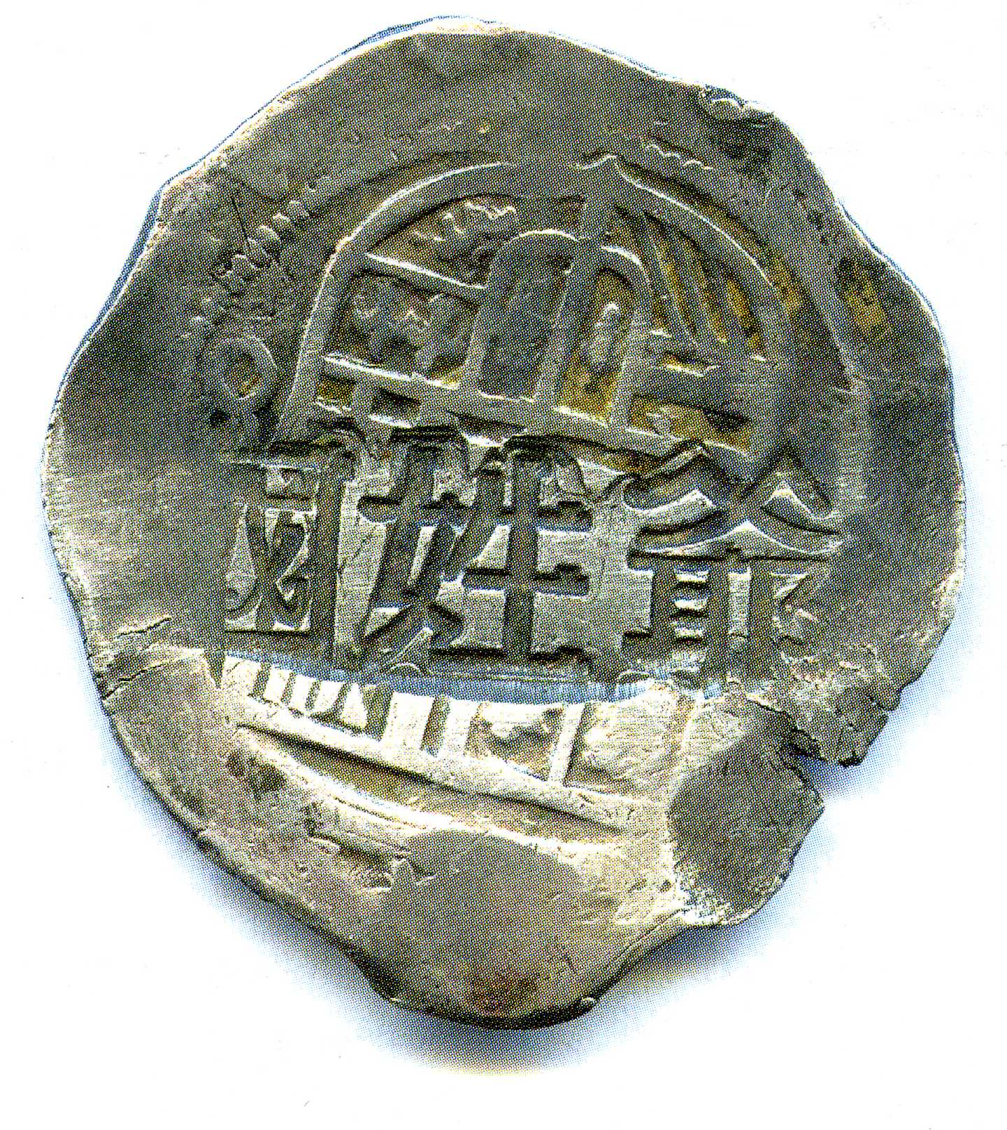 Moneda española contramarcada por el pirata Koxinga 國姓爺.